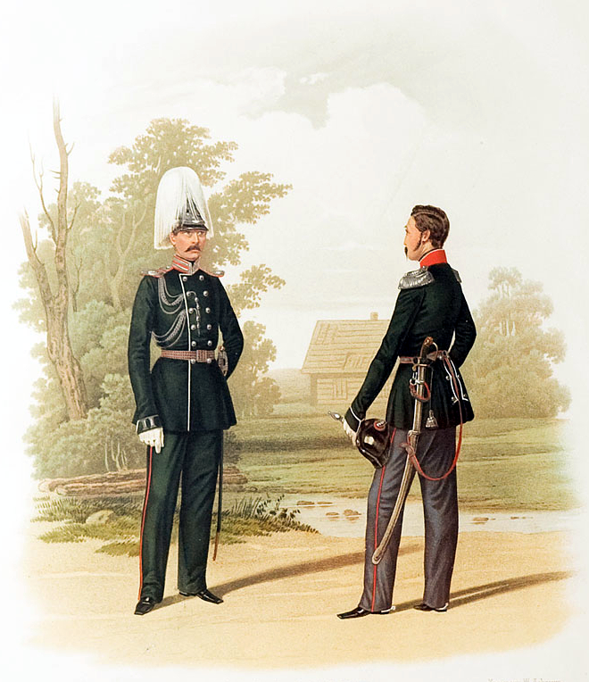 Адъютант и Дежурный Штаб-офицер, числящиеся в Армейских войсках. (В полукафтане и вице-полукафтане.) 15 Марта 1855.